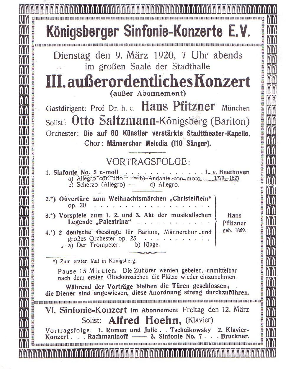 Konzertprogramm mit Hans Pfitzner in Königsberg, 1920